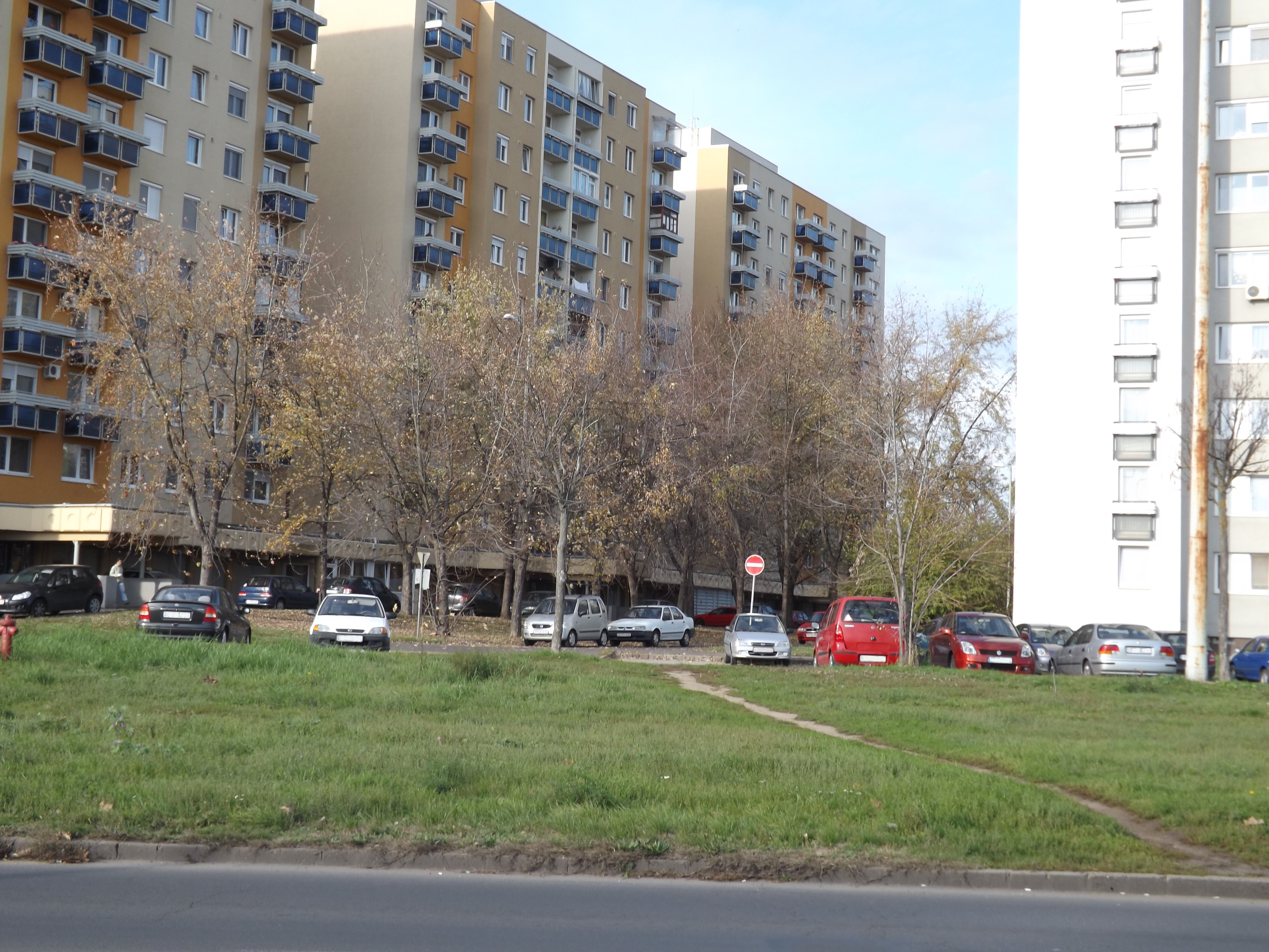 Debrecen, Tócóskerti lakótelep a Vincellér utca felől